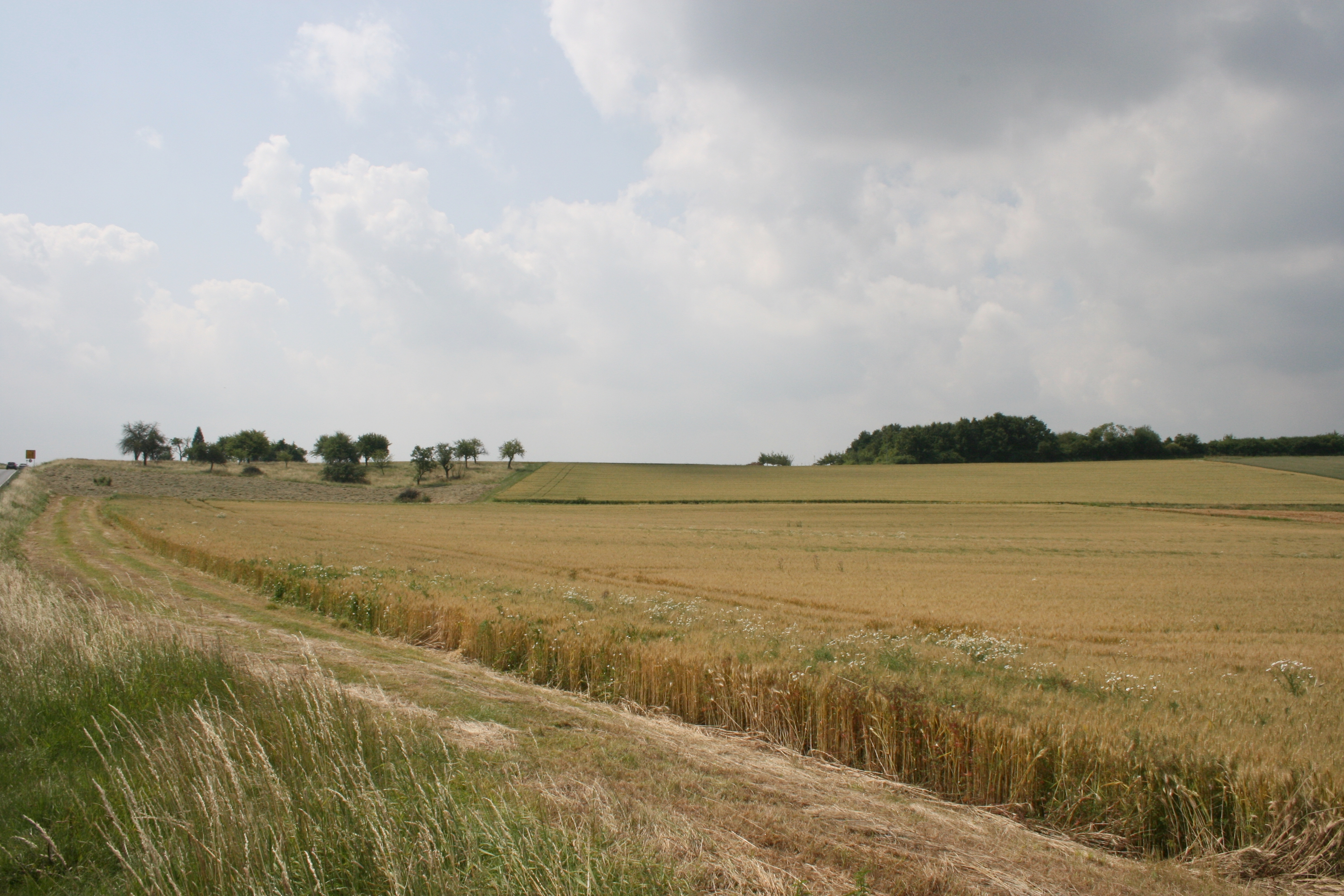 Kleinkastell Lochberg, Gde. Echzell am Obergermanisch-Raetischen Limes. Ansicht des Kastellareals von Norden.